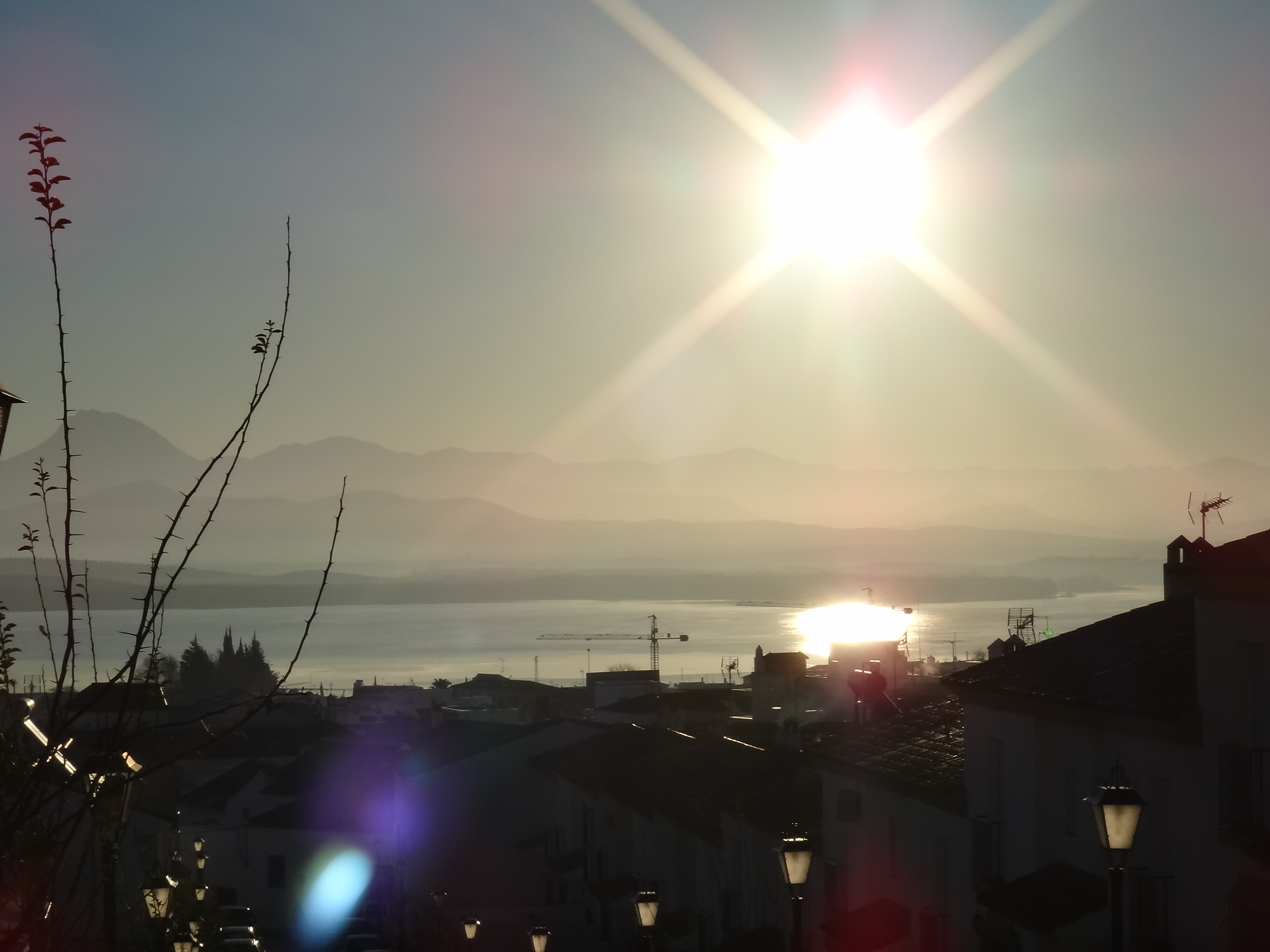 Bornos y su embalse